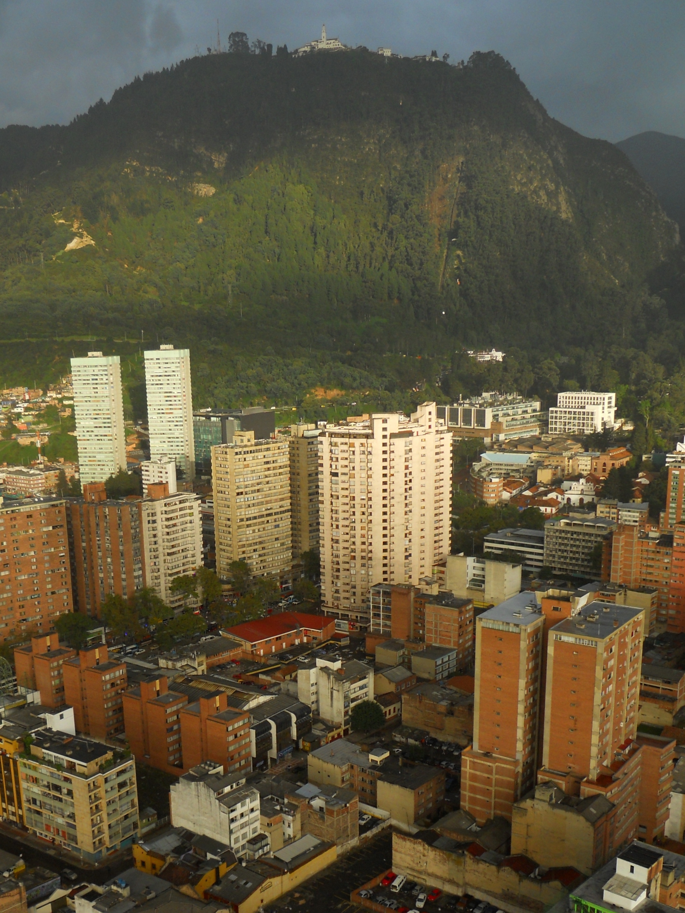 Cerro de Monserrate de Bogotá. En primer plano edificios de la avenida calle Diecinueve, al derecha universidad de Los Andes. a la izquierda las torres de Fenicia.